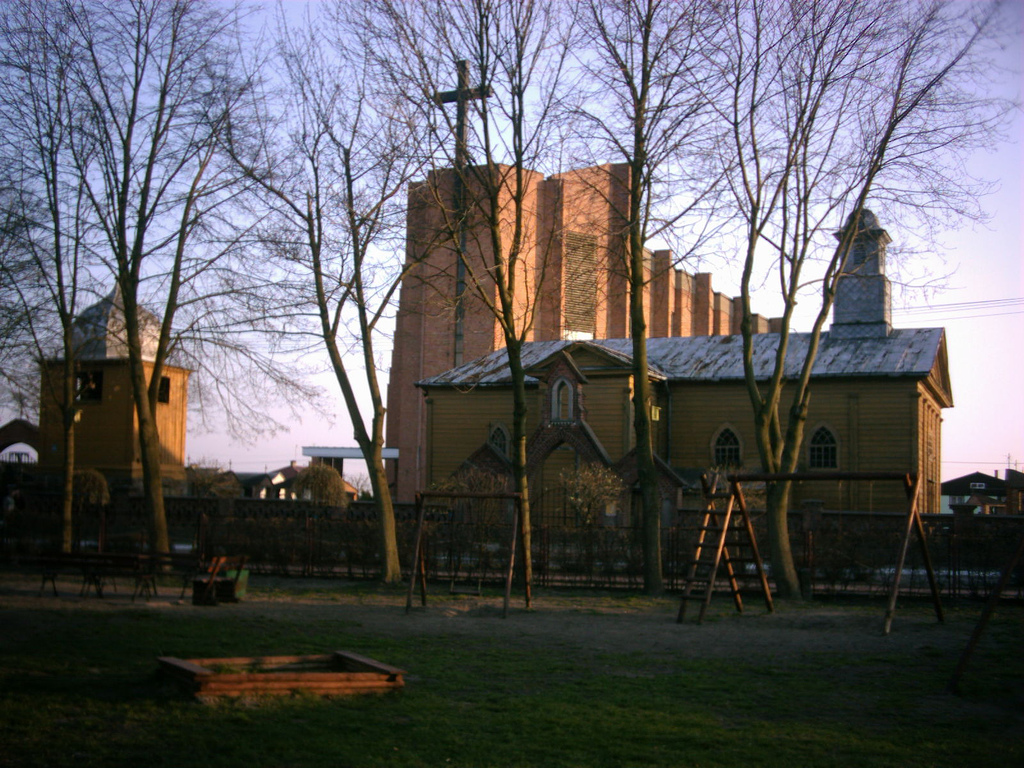 Zawidz Kościelny - kościół parafialny pw. św. Marcina, drewn. 1742, dzwonnica drewn. 2 poł. XIX, cmentarz przykościelny (zabytek nr 601/62), w tle - nowy kościół.